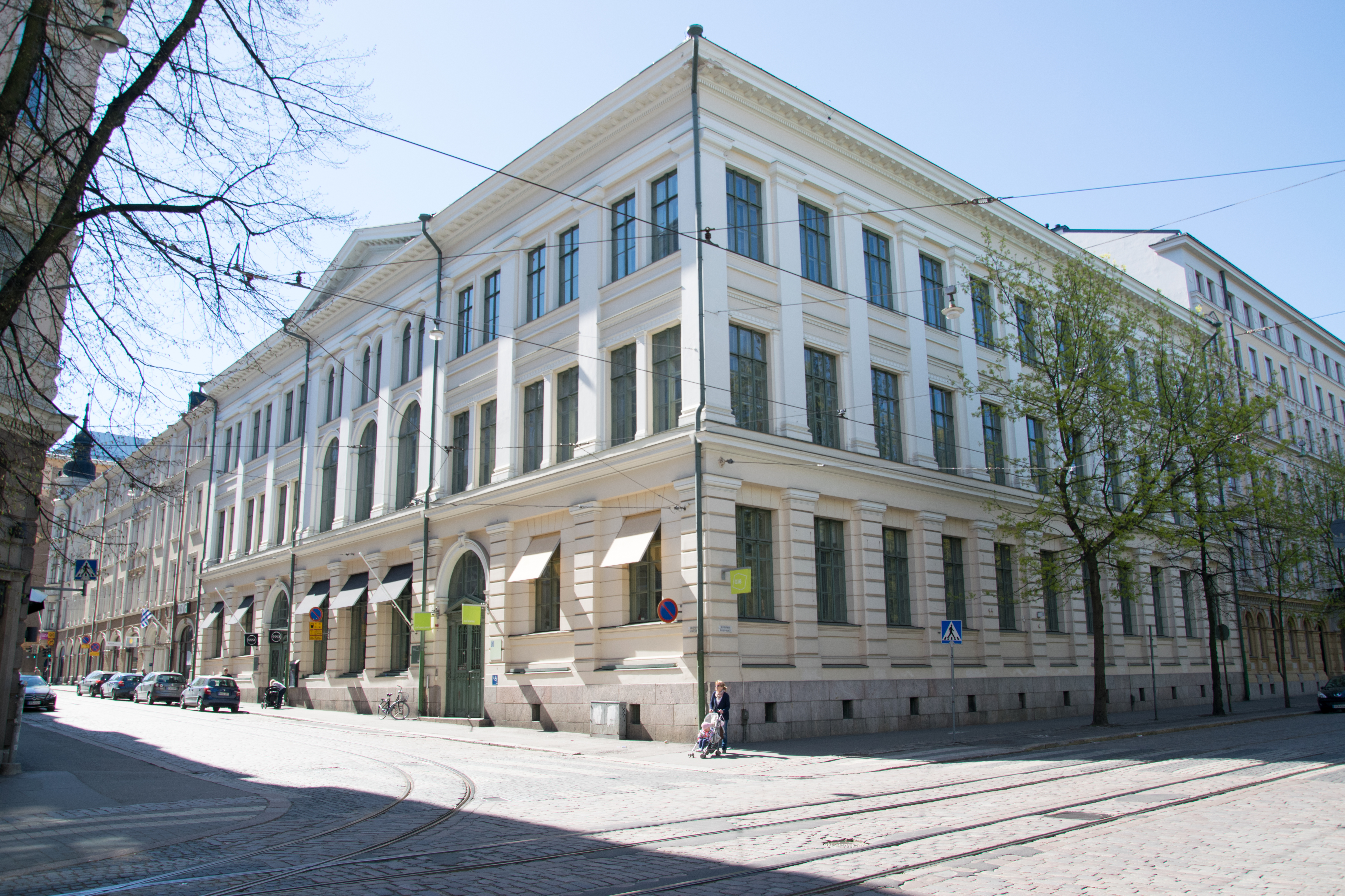 Juhlasali G18 -rakennus Helsingin Kampissa